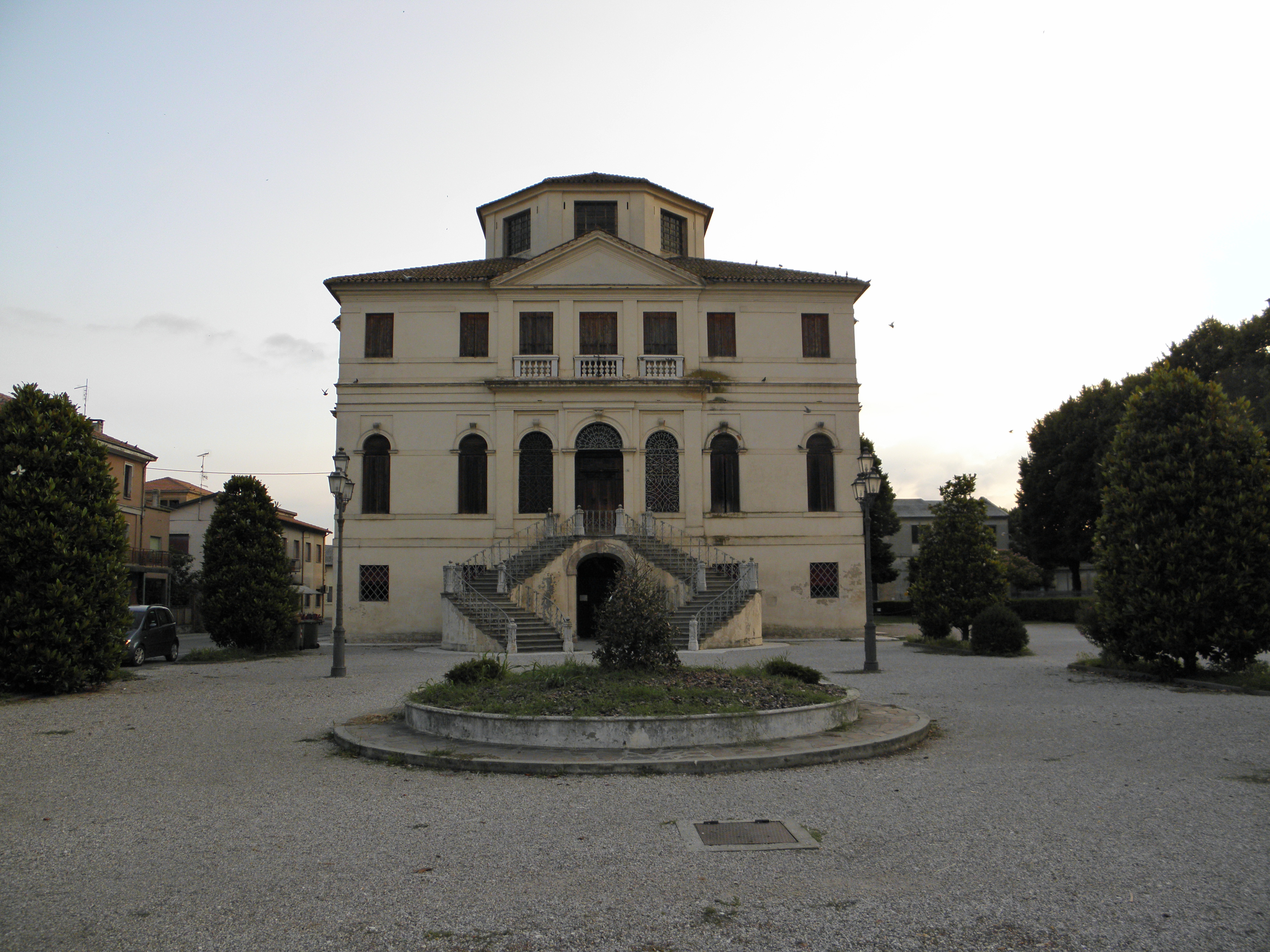 Fiesso Umbertiano: Villa Morosini Vendramin Calergi, nota più semplicemente come Villa Vendramin, ora sede municipale.